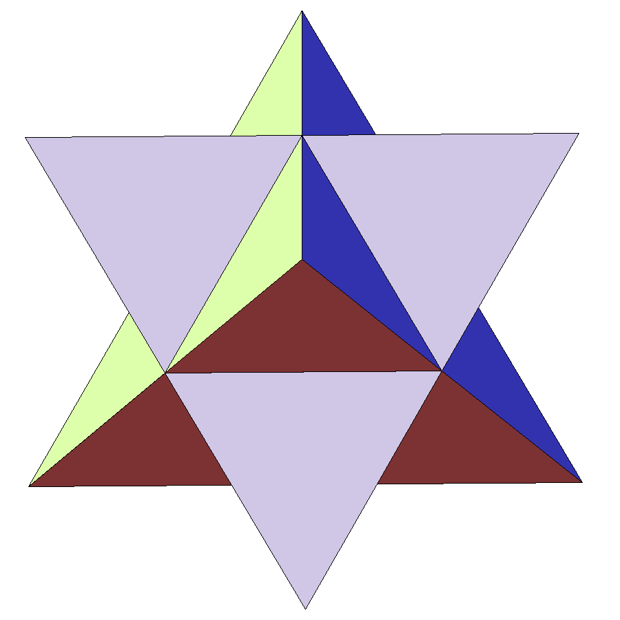 Первая звёздчатая форма октаэдра.